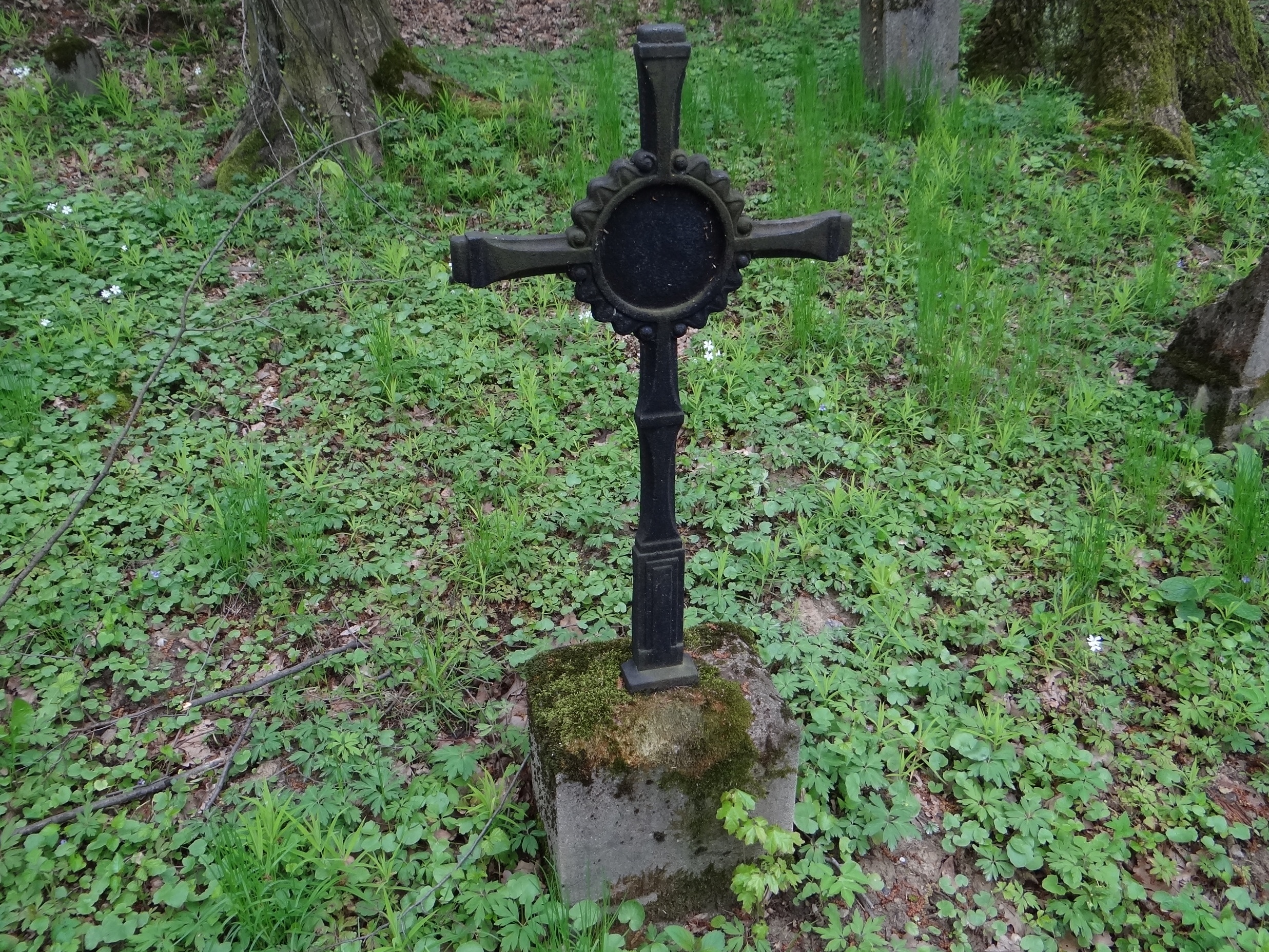 Cmentarz wojenny nr 148 – Chojnik